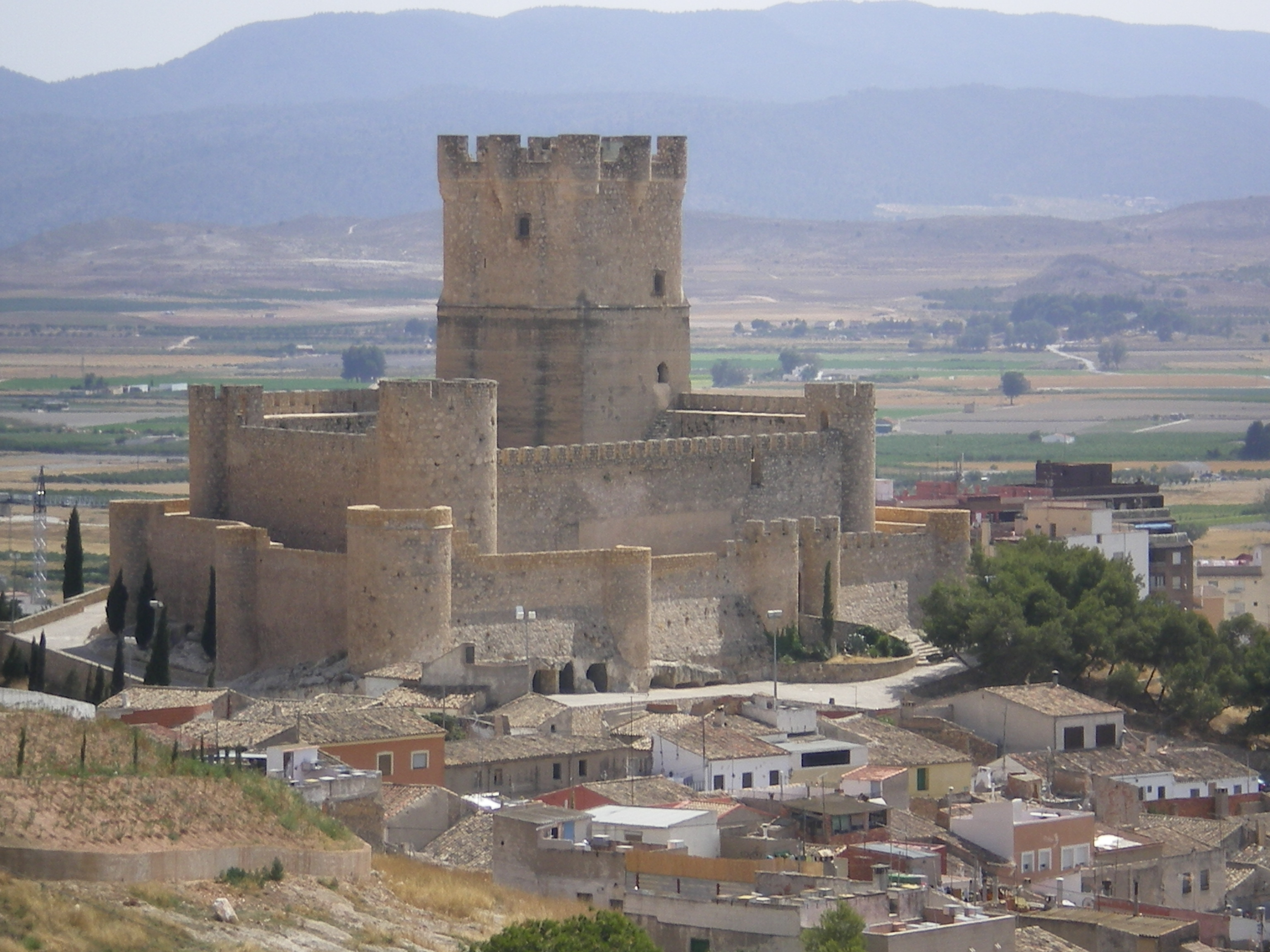 Castillo de la Atalaya (Villena), Visto desde el mirador de Las Cruces.